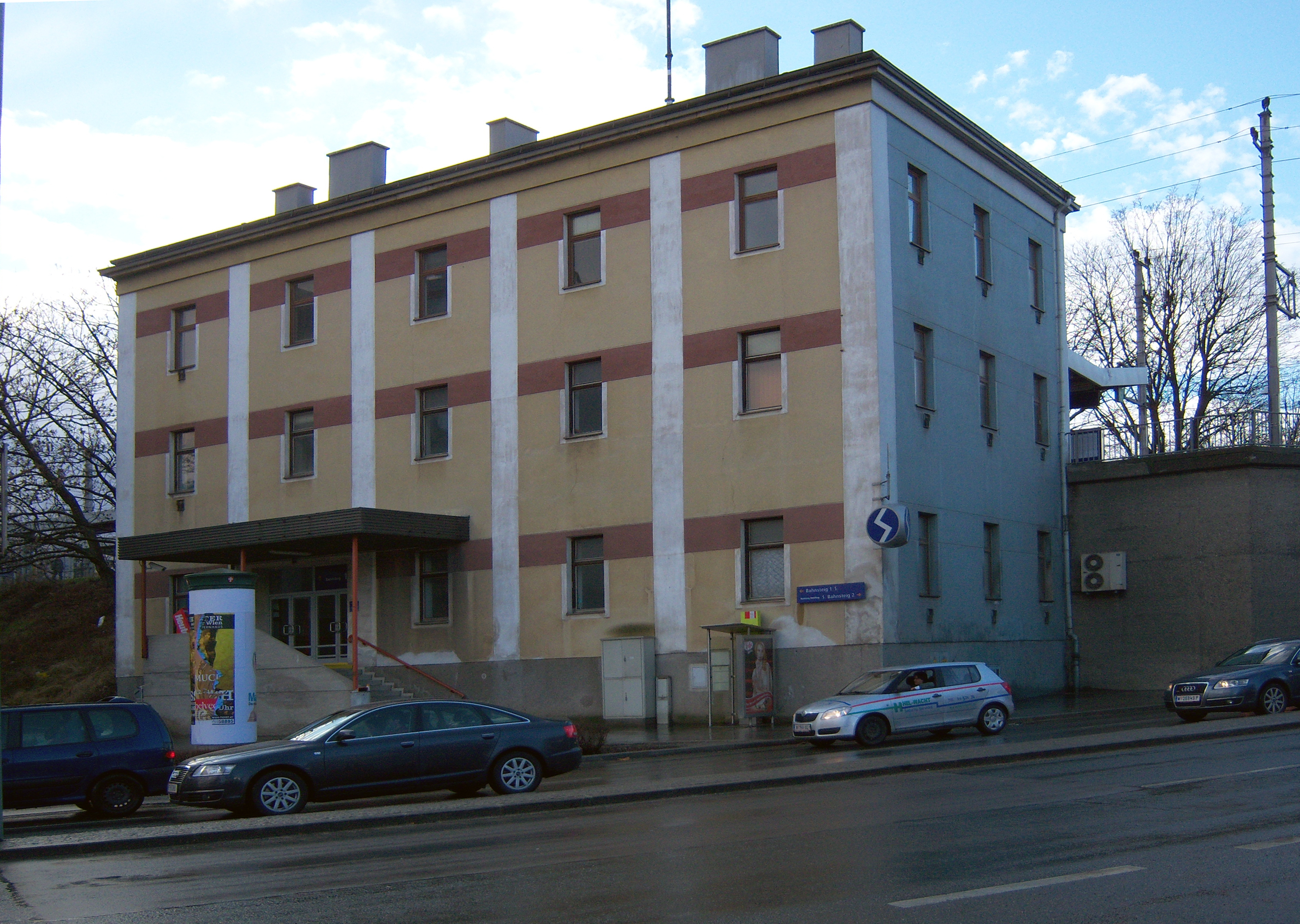 Bahnhof Wien Hetzendorf